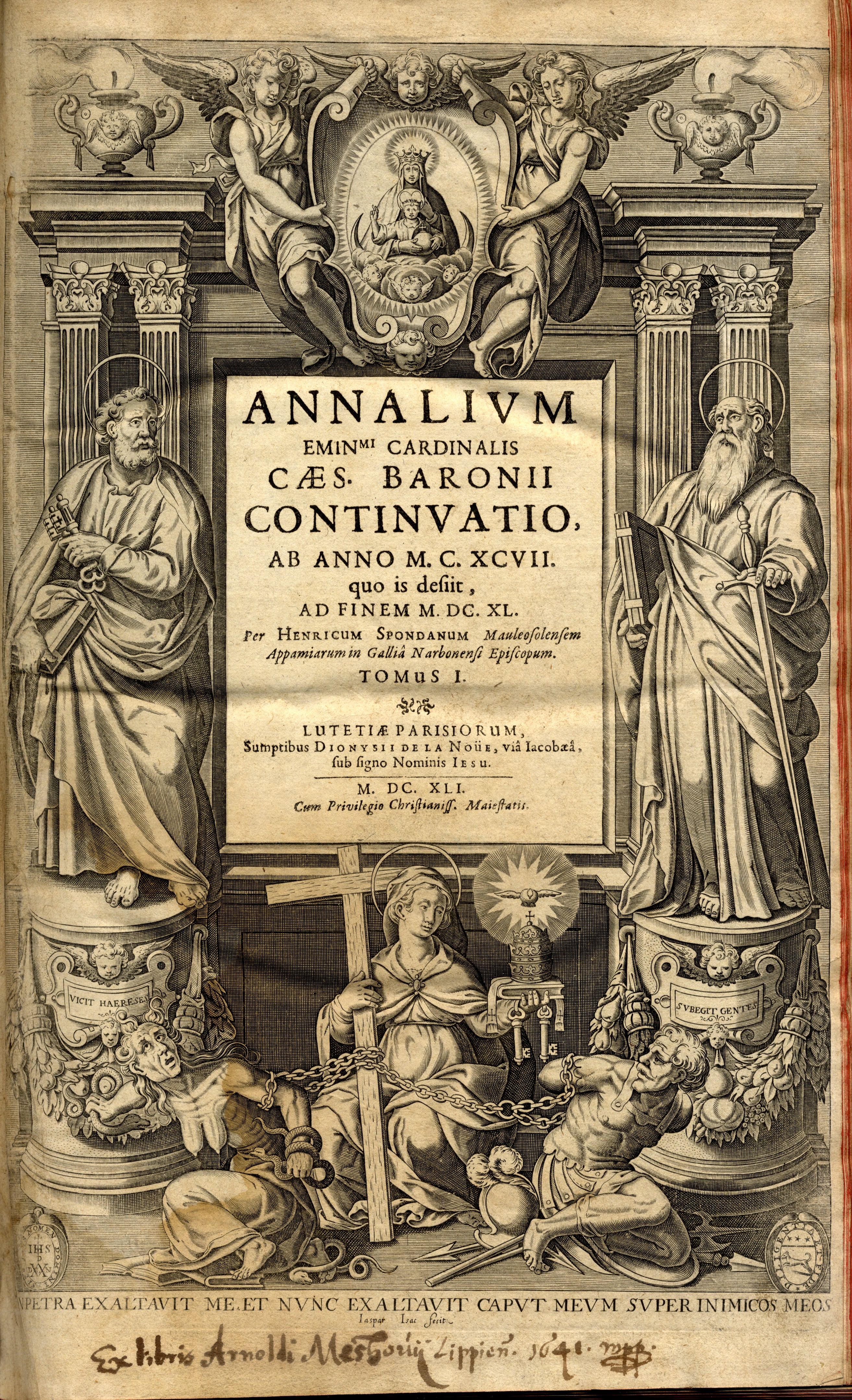 Annalivm